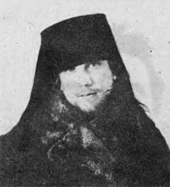 Archimandryta Smaragd (Łatyszenko)